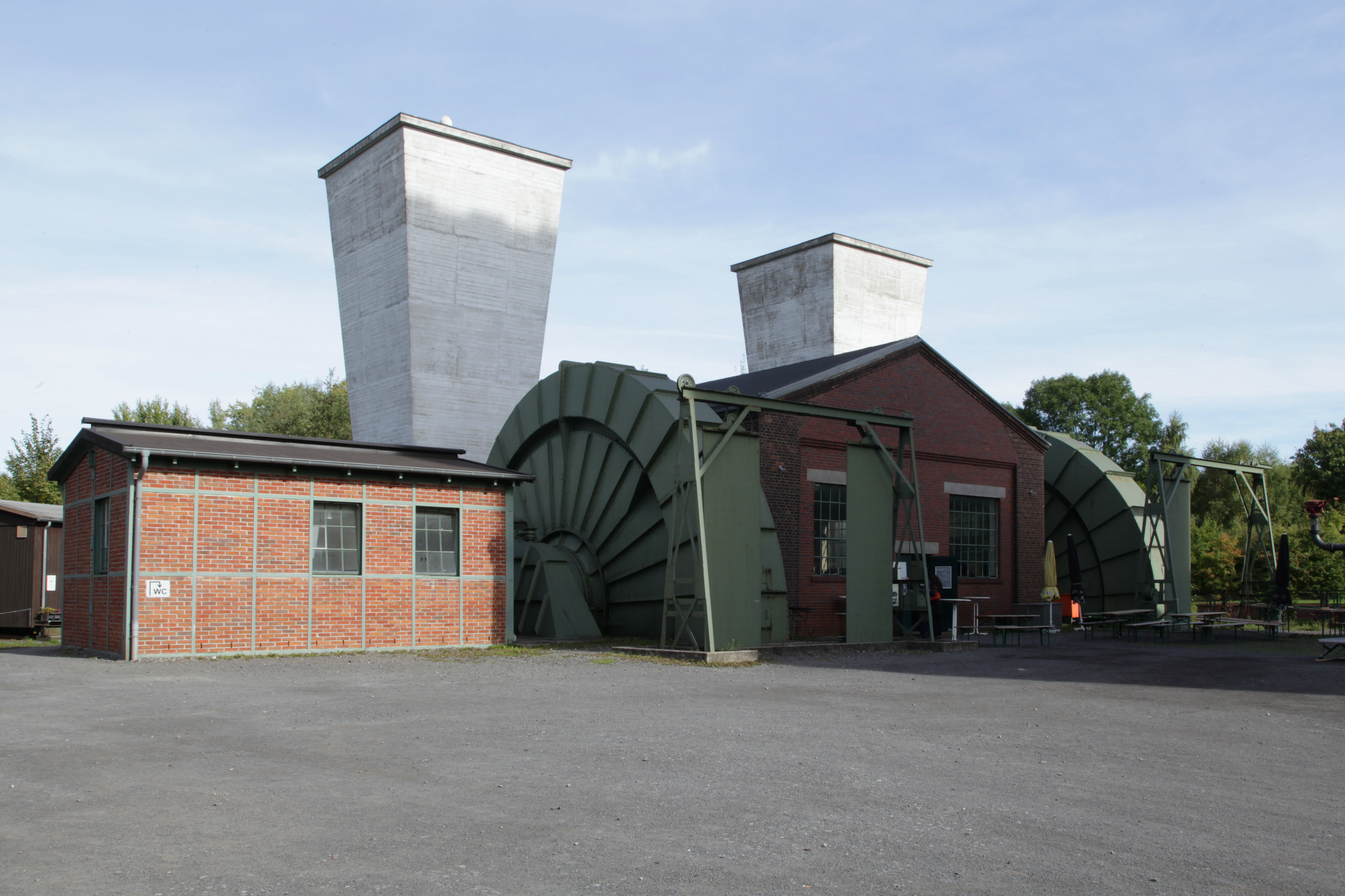 Lüftergebäude der Zeche Hannover, Günnigfelder Straße in Bochum